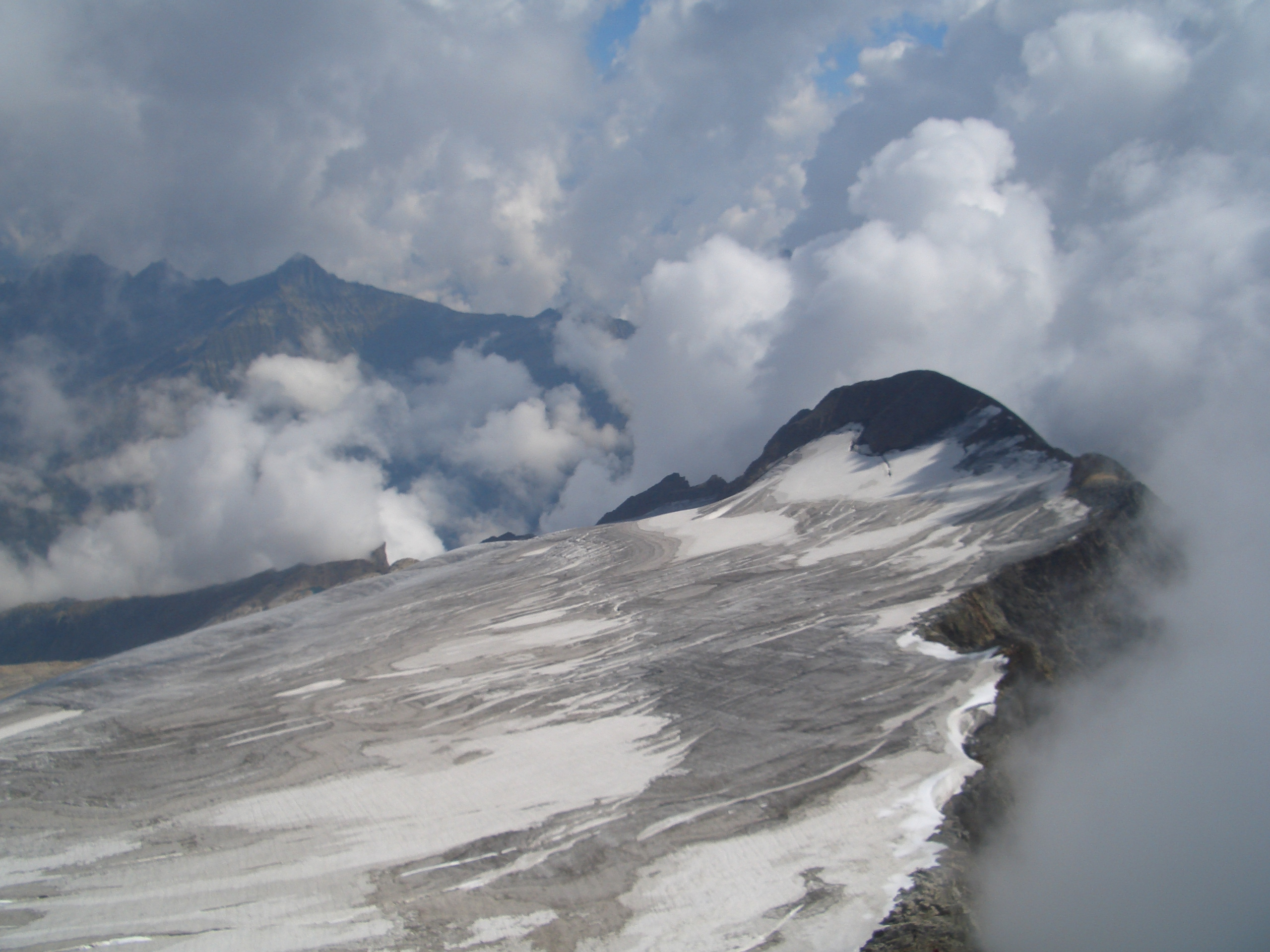 Monte Basòdino - Der Gletscher vom Gipfel aus.